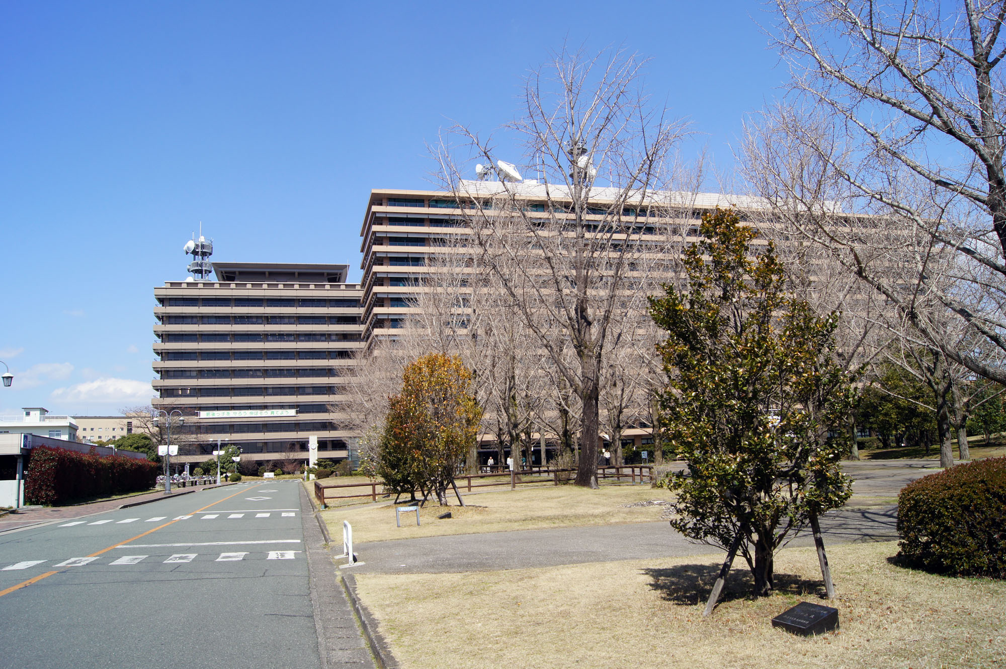 熊本県庁 外観